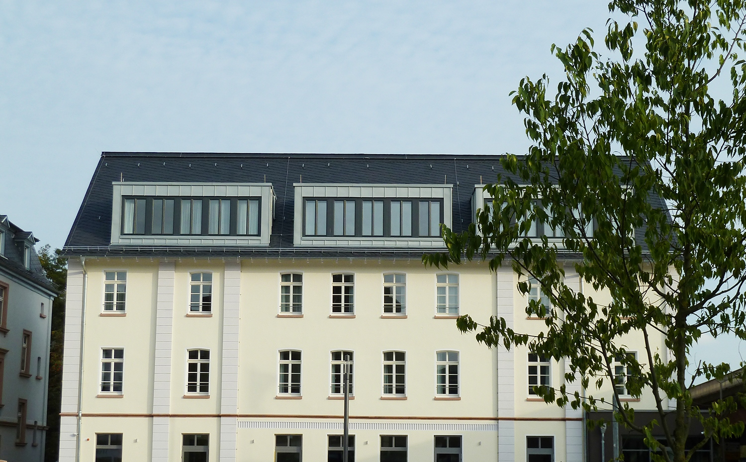 Marburg, Bahnhofstraße 23. Fachhochschule der Wirtschaft.